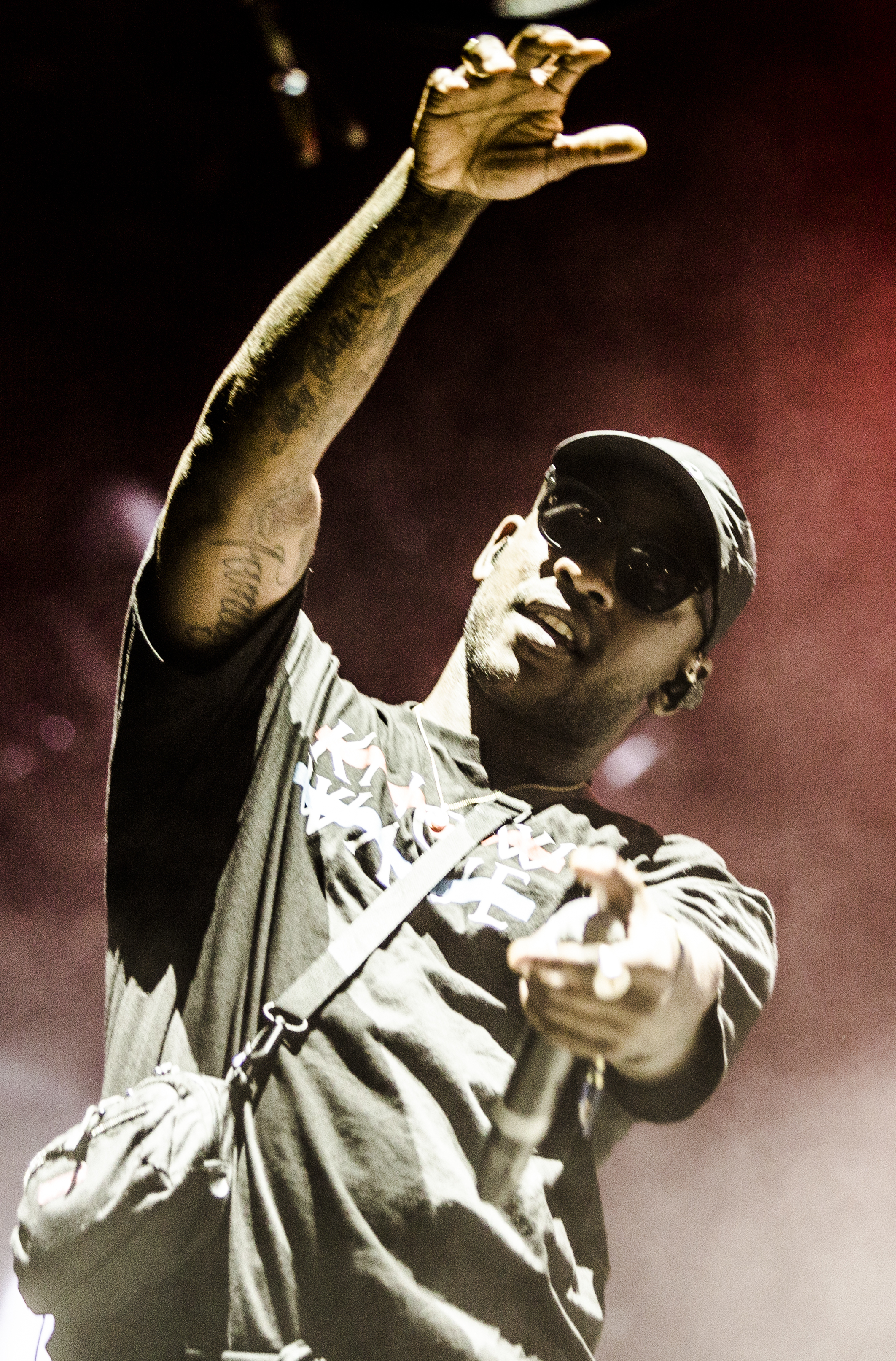 F.I.B. 2016